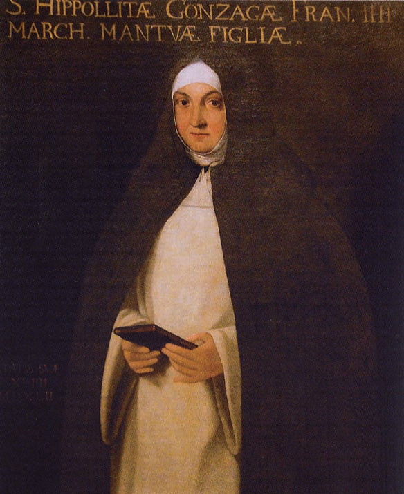 Ritratto di Ippolita Gonzaga (1503-1570)